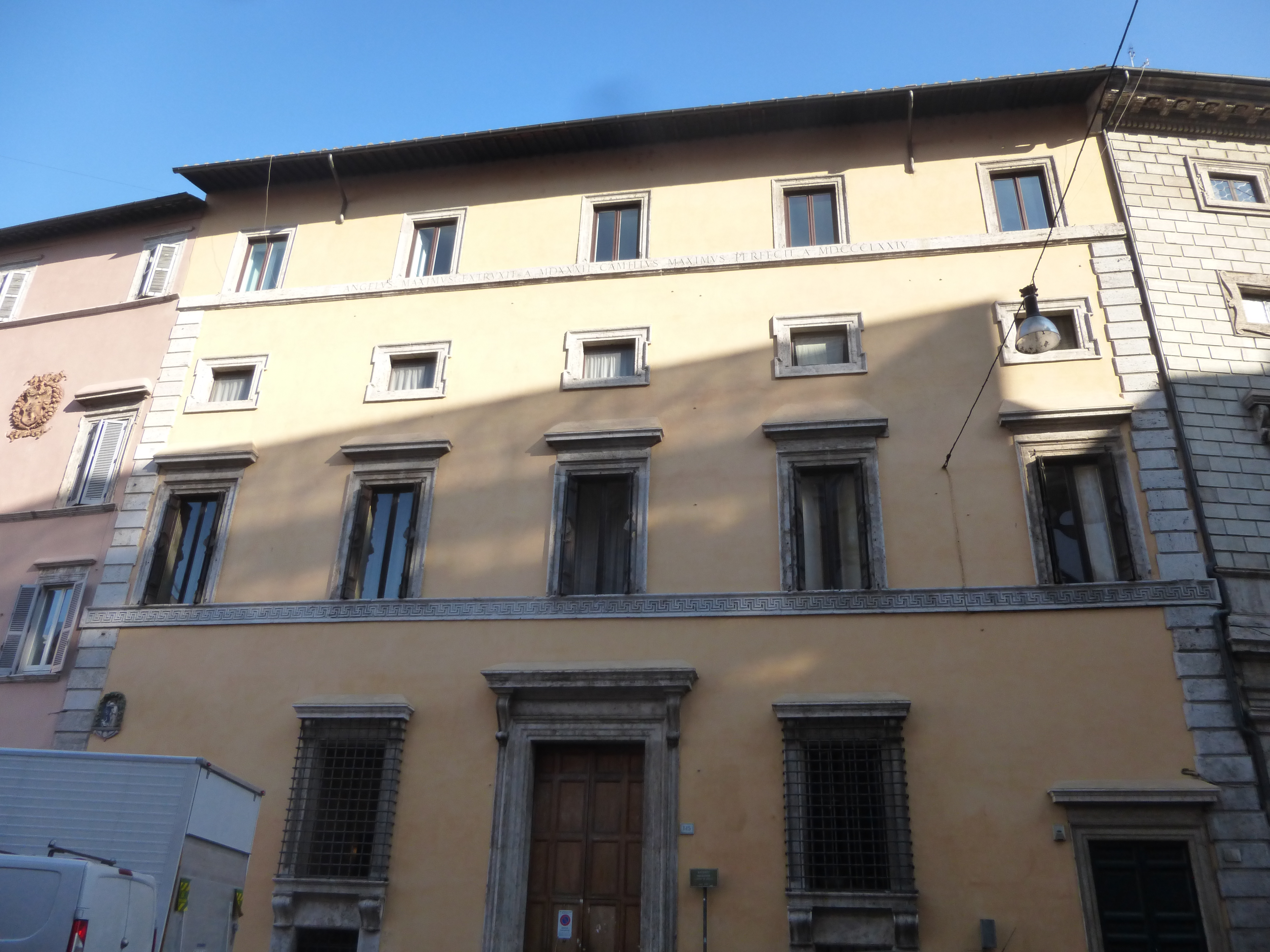 Roma, Palazzo Massimo di Pirro. Fronte su corso Vittorio Emanuele II.